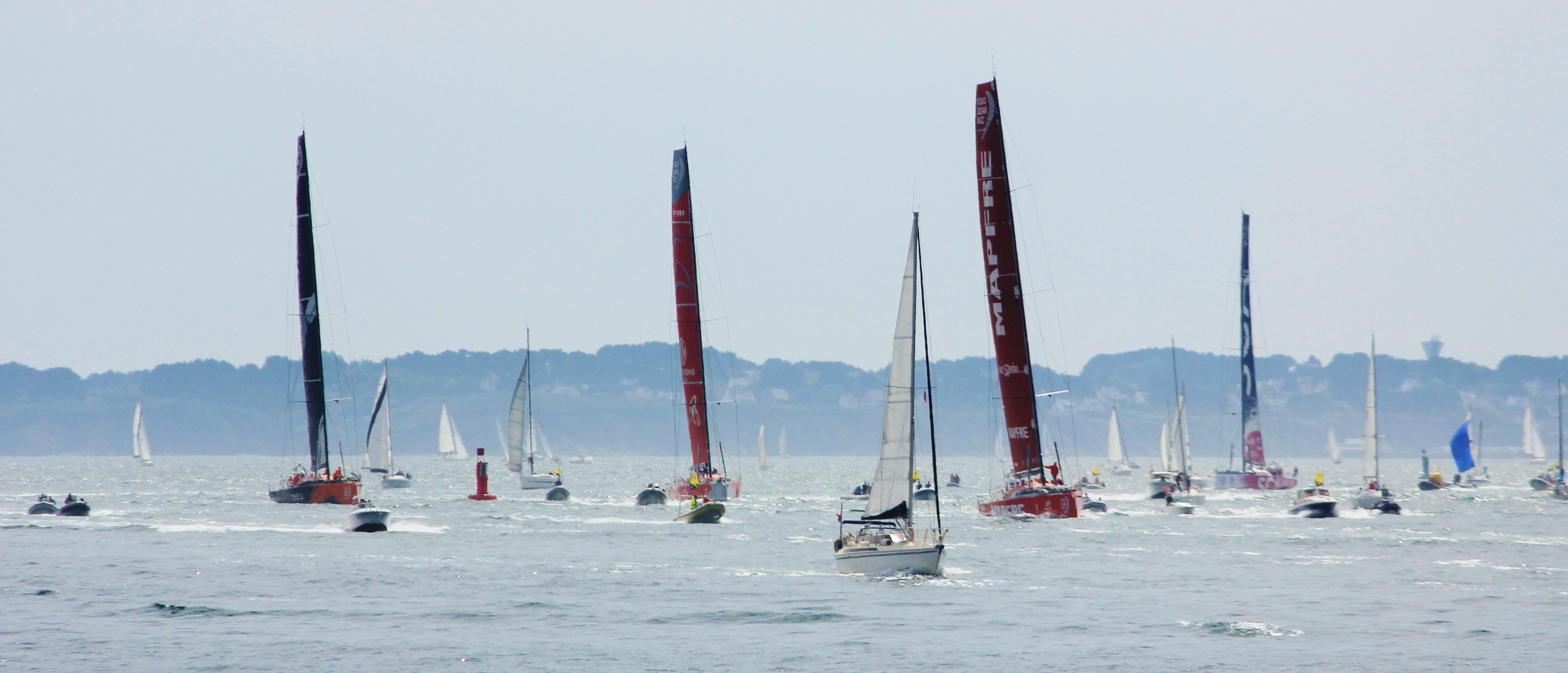 Course in-port de la Volvo Ocean Race à Lorient